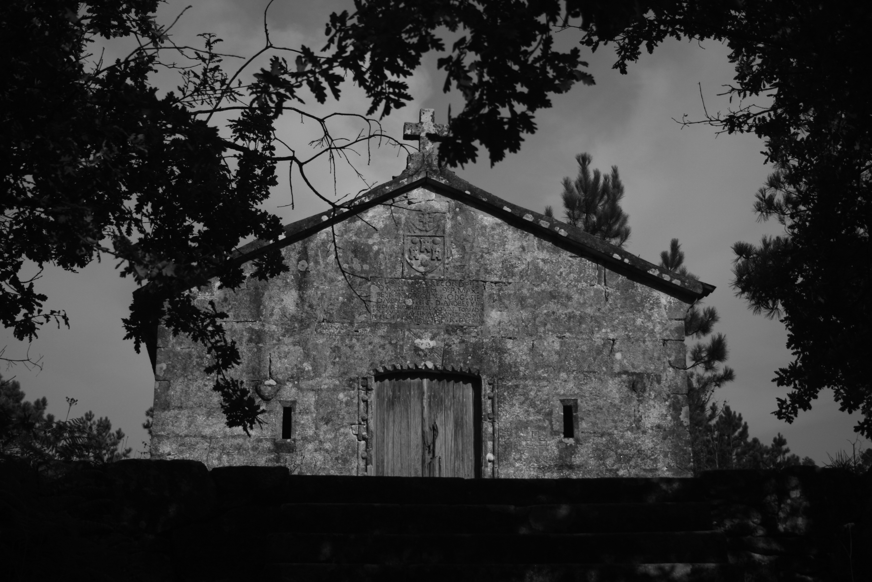 O acceso non é precisamente fácil e é doado pasar por alí sen saber que hai preto unha ermida. Está nun sitio illado no medio do monte e só recupera a vida cando en Asados se celebra a festa de San Pedro, non lembro exactamente que domingo do verán. Polo demais, debe ser unha das capelas máis antigas do concello, xa que diante ten unha inscrición que data do ano 1671.